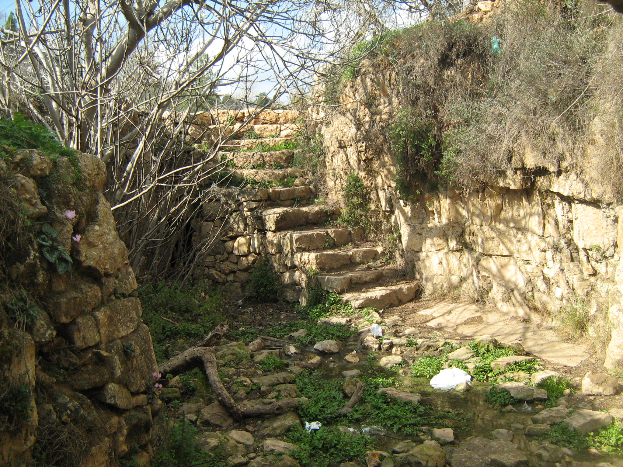 עין חנדק